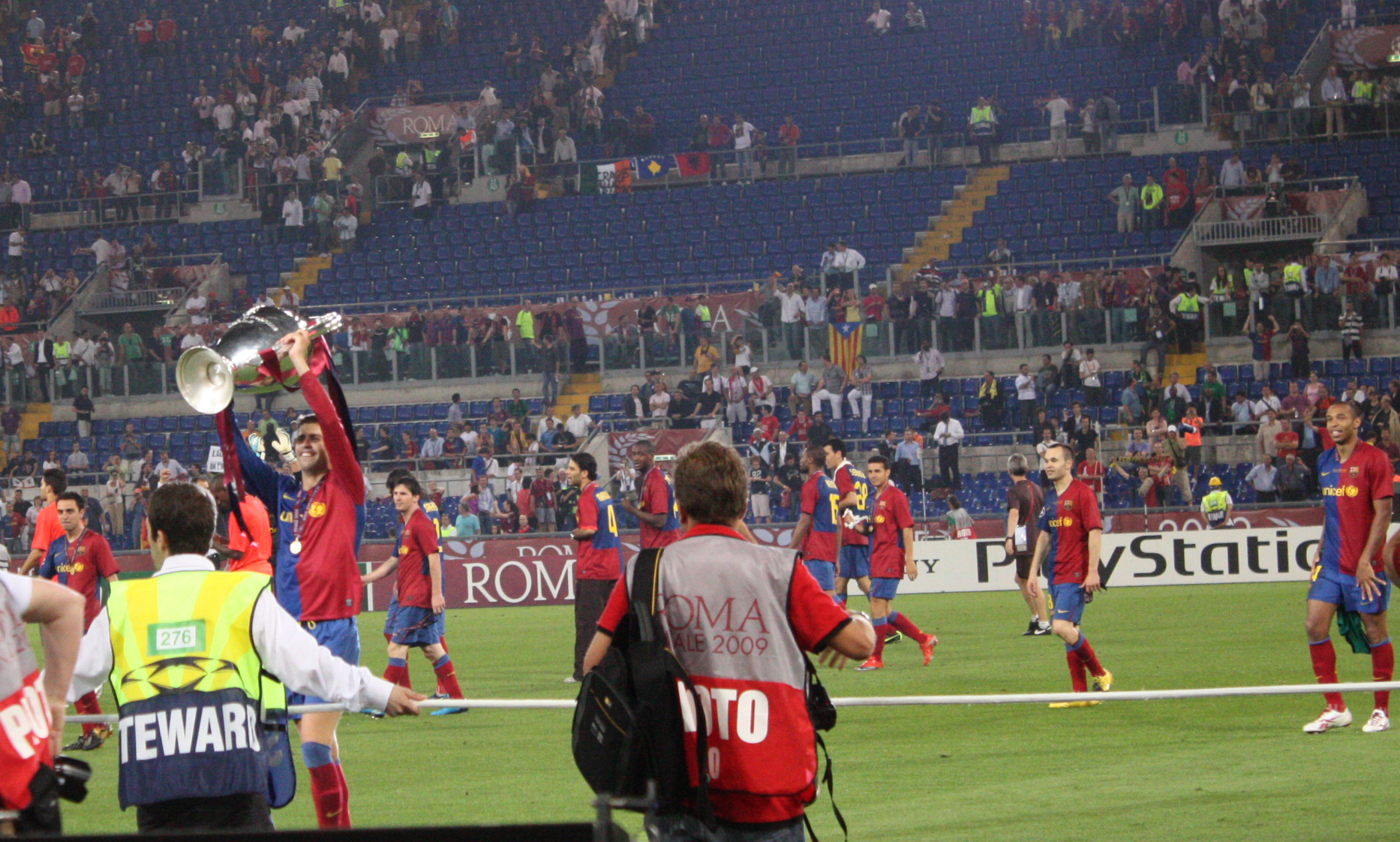 Celebración tras la final de la UEFA Champions League 2008-2009. Piqué con la Copa, también Xavi, Messi, Márquez, Toure Yayá, Busquets, Keita, Pedro, Iniesta y Henry.